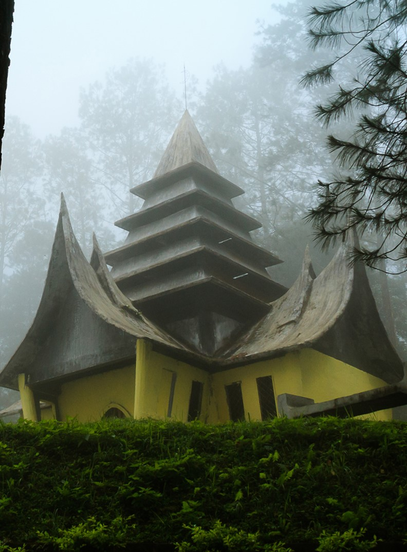 Monumen Perjanjian Sumpah Satiah Bukit Marapalam adalah satu destinasi yang terletak di Puncak Pato, Nagari Batu Bulek, Kecamatan Lintau Buo Utara, Kabupaten Tanah Datar, Propinsi Sumatera Barat.. Di sinilah tercatat sebagai tempat terjadinya peristiwa bersejarah dalam perjalanan masyarakat adat Minangkabau yang dikenal dengan nama Sumpah Satie Bukik Marapalam yang isnya antara lain “Adat Basandi Syarak, Syarak Basandi Kitabullah”